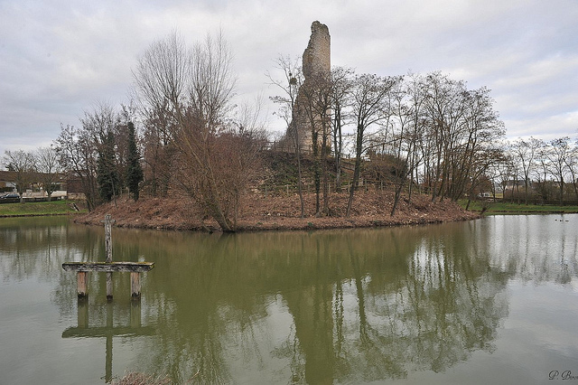 La Tour.